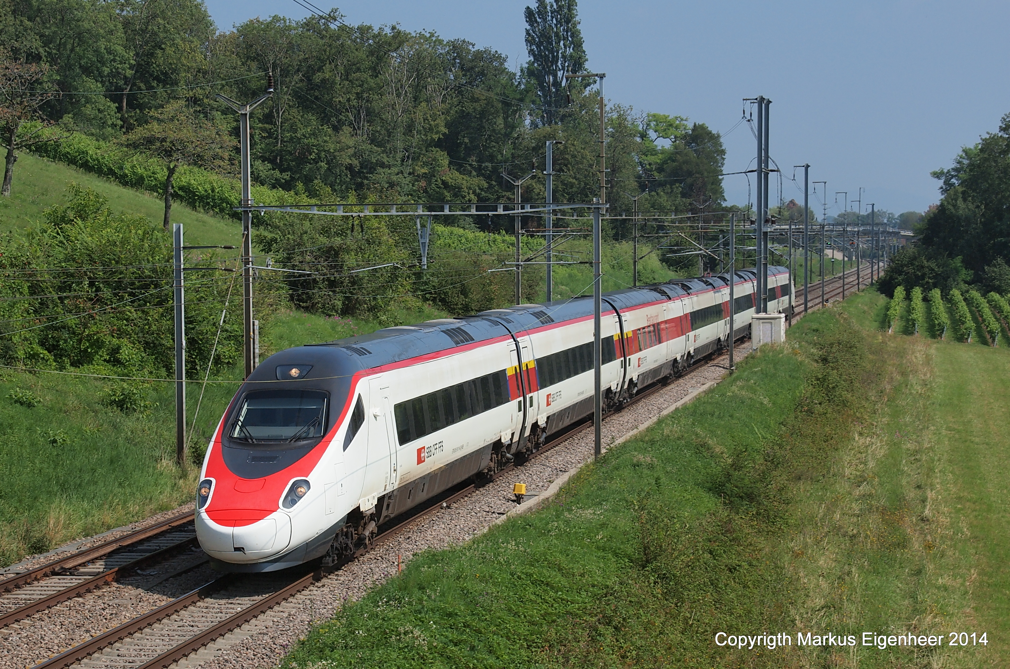 Celigny 29.08.2013